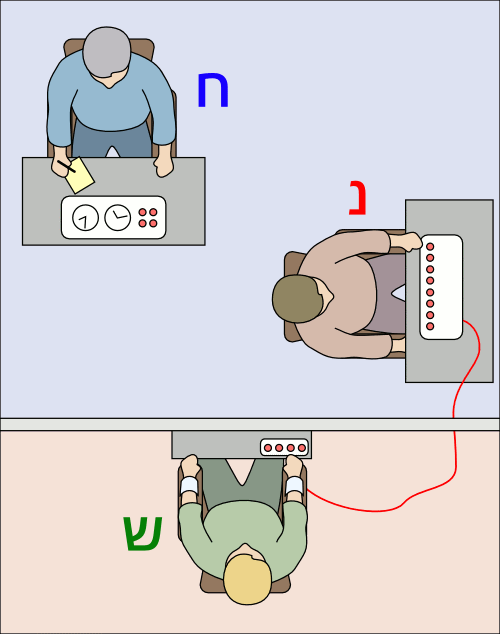 איור המחשה ל"ניסוי של מילגרם" שיצר משתמש בוויקי האנגלית. הותאם עם אותיות עבריות ע"י המשתמשת שהעלתה את הקובץ.